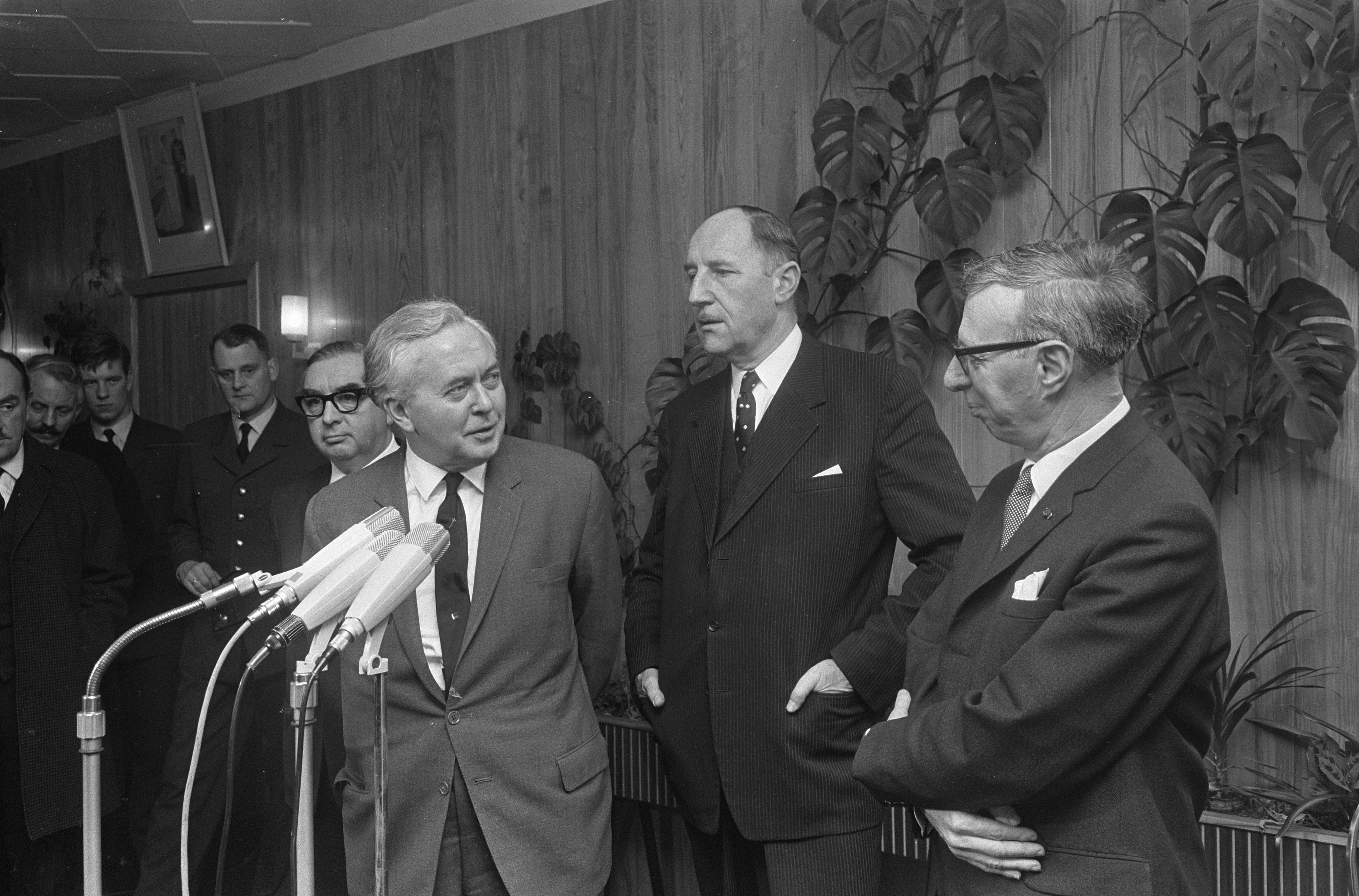 Collectie / Archief : Fotocollectie Anefo Reportage / Serie : [ onbekend ] Beschrijving : Aankomst Premier Wilson en Minister Brown op vliegvel Ypenburg Datum : 26 februari 1967 Locatie : Den Haag, Ypenburg, Zuid-Holland Trefwoorden : ministers Persoonsnaam : Brown, Ron, Wilson, Harold Fotograaf : Koch, Eric / Anefo Auteursrechthebbende : Nationaal Archief Materiaalsoort : Negatief (zwart/wit) Nummer archiefinventaris : bekijk toegang 2.24.01.05 Bestanddeelnummer : 920-1138